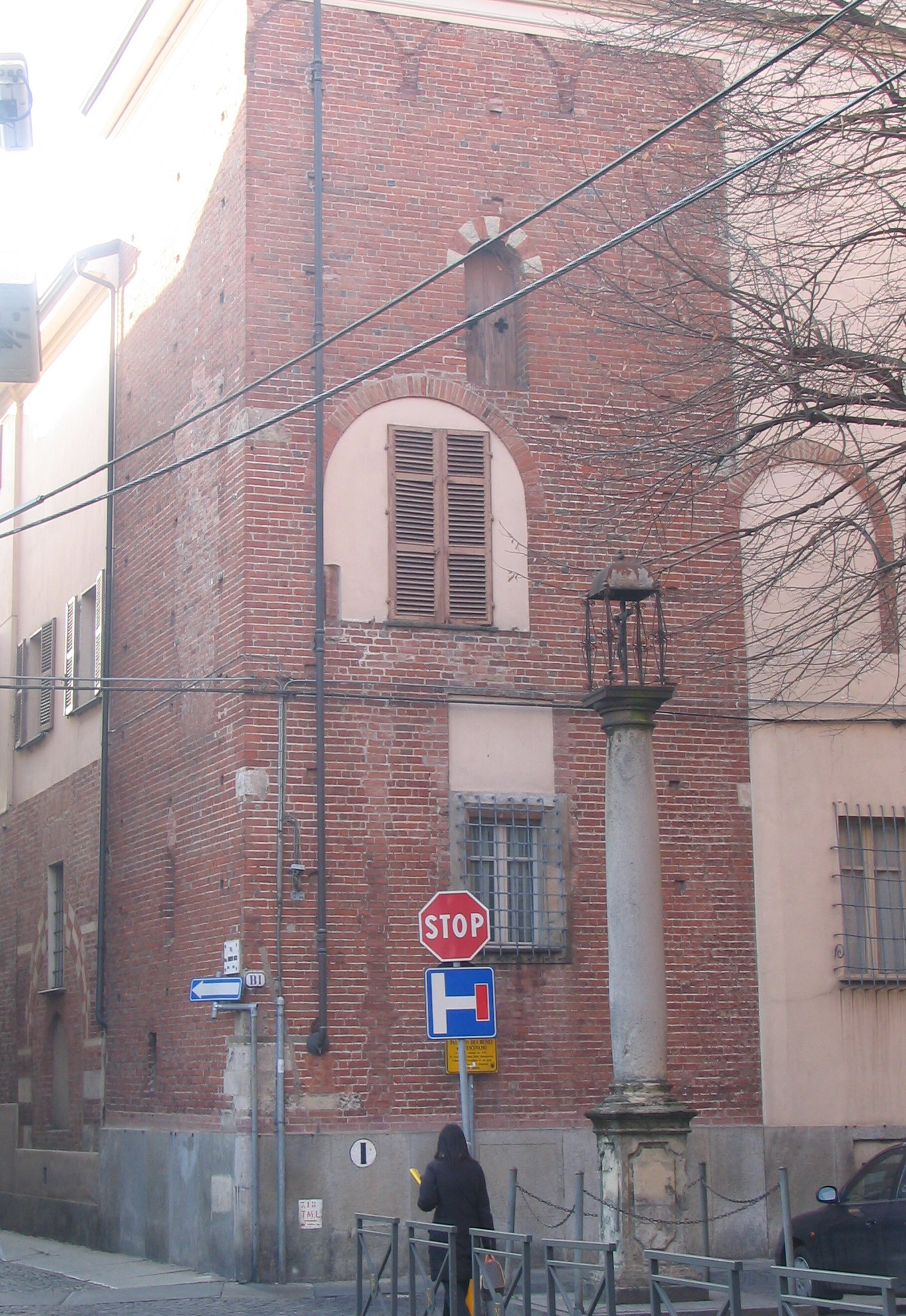 colonna davanti al palazzo del Seminario Vescovile Asti